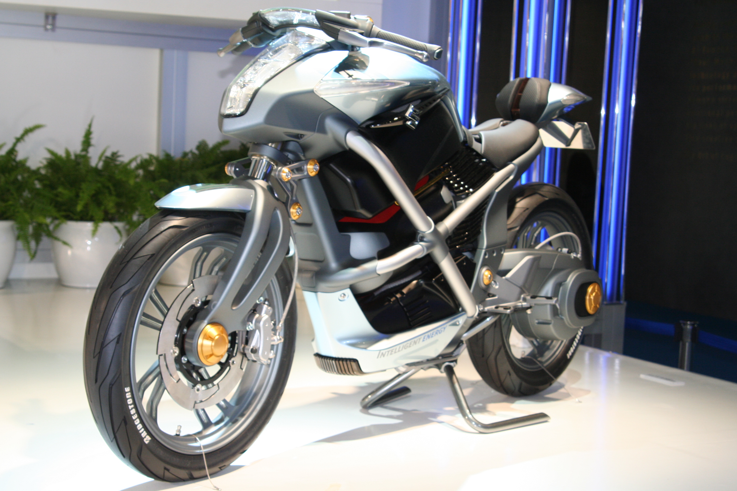 crosscage